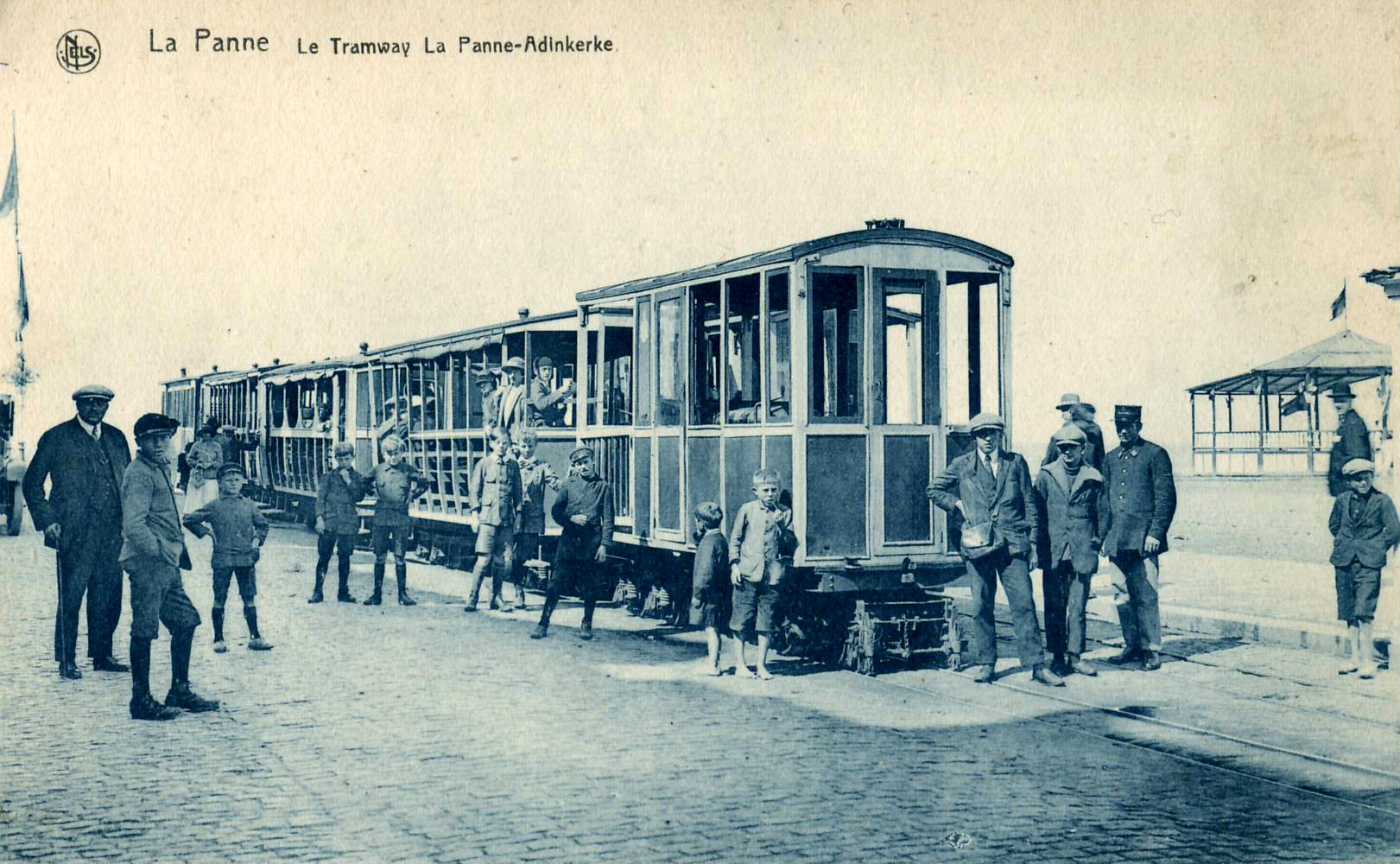 Carte postale ancienne éditée par Nels :LA PANNE - Le Tramway La Panne - Adinkerke